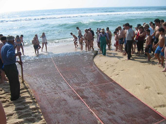 Praia de Mira - Pesca artesanal